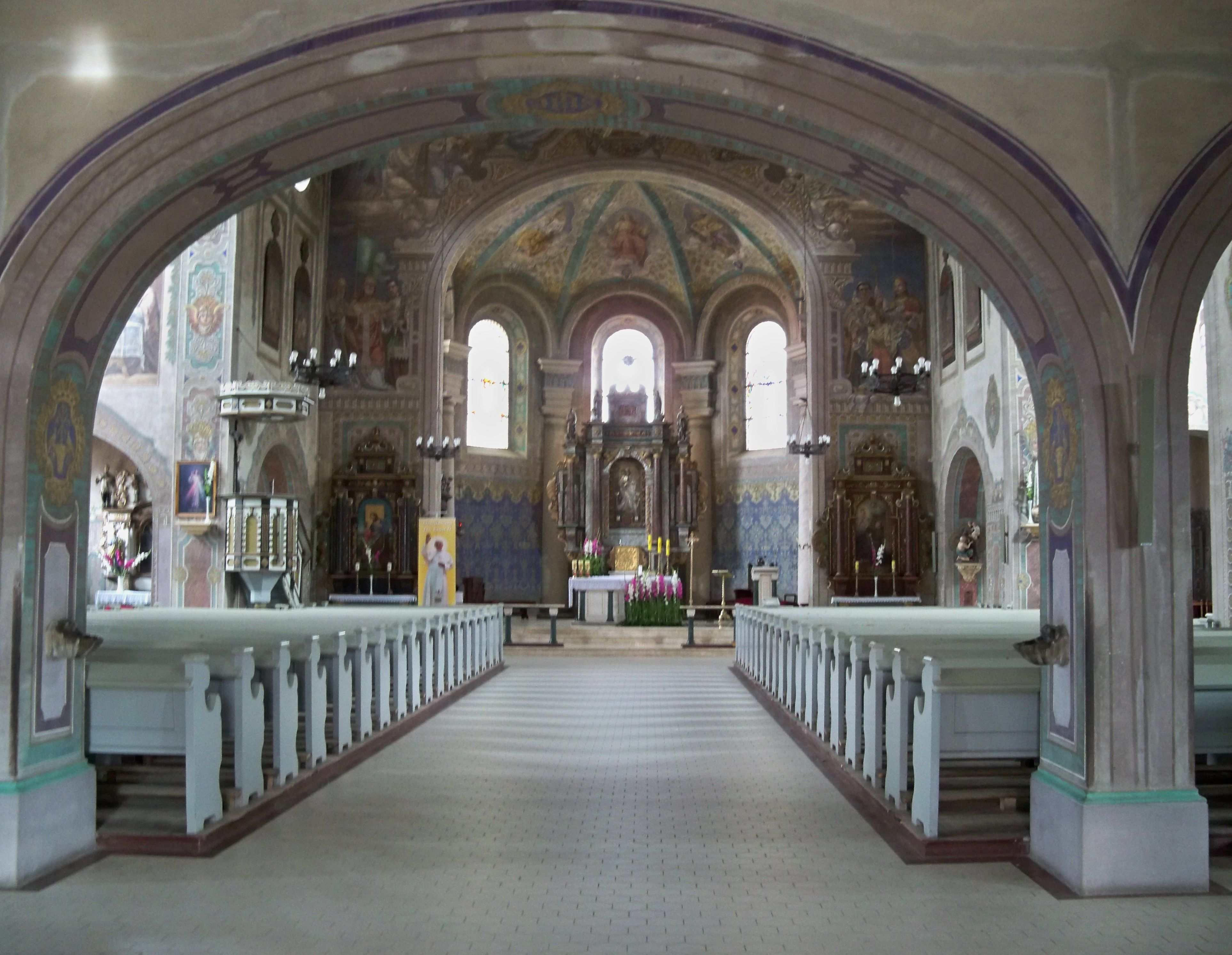 Wnętrze kościoła w Wielu